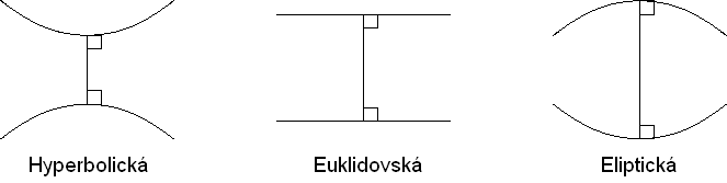 Chování rovnoběžek v euklidovské a dvou neeuklidovských geometriích.